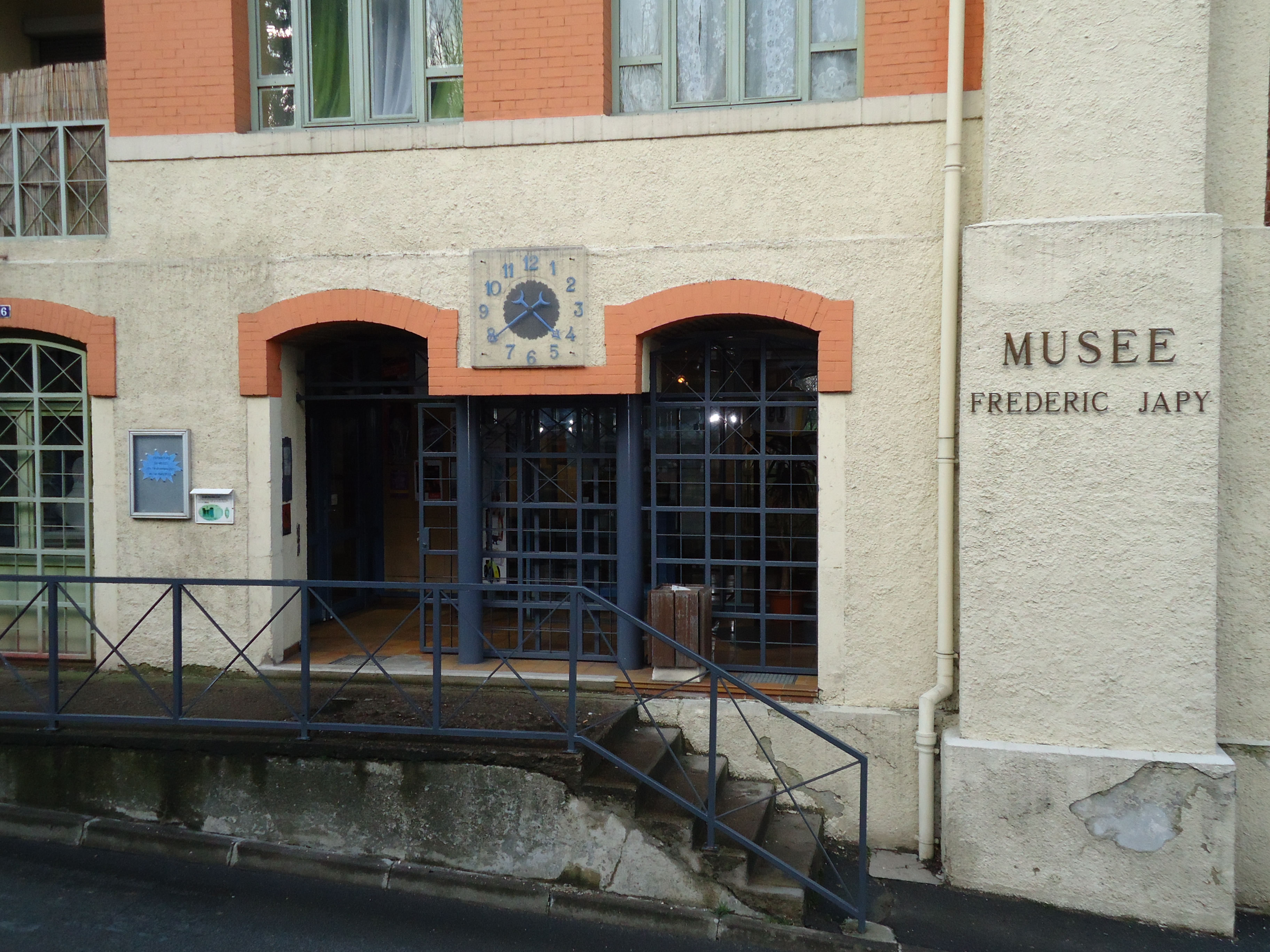 Musée Japy